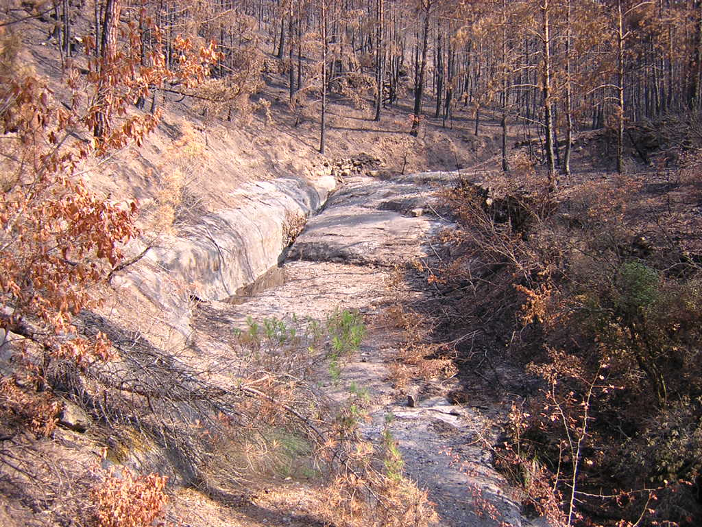 El torrent de l'Hort de l'Om (Monistrol de Calders, Moianès)